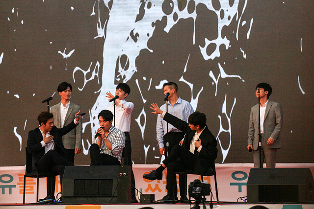 5월 26일 우유의 날 & 치즈에 퐁당 페스티벌 비투비(BTOB)